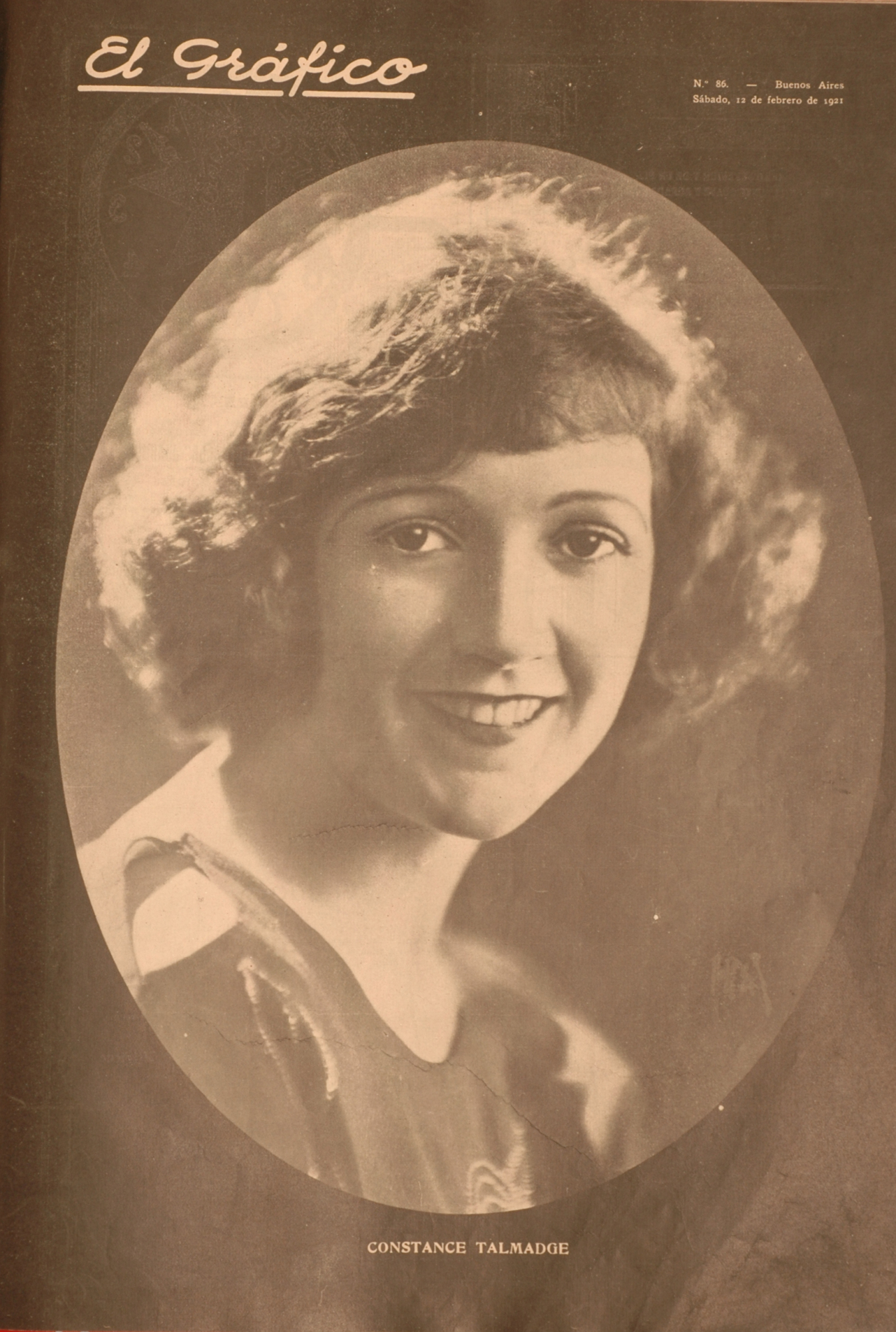 El Grafico del 12 de Febrero de 1921. Edicion 86